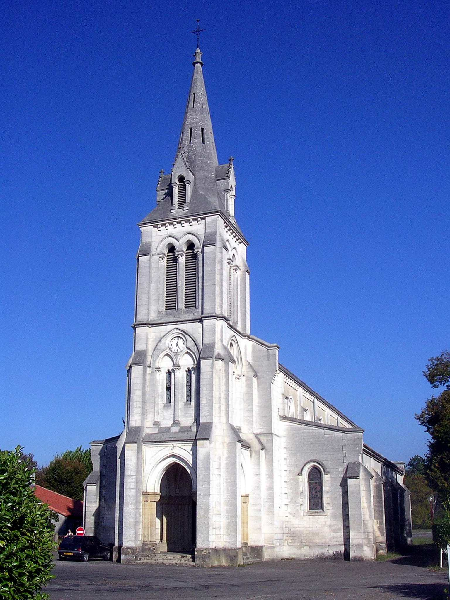 Eglise de Pissos, dans le département français des Landes